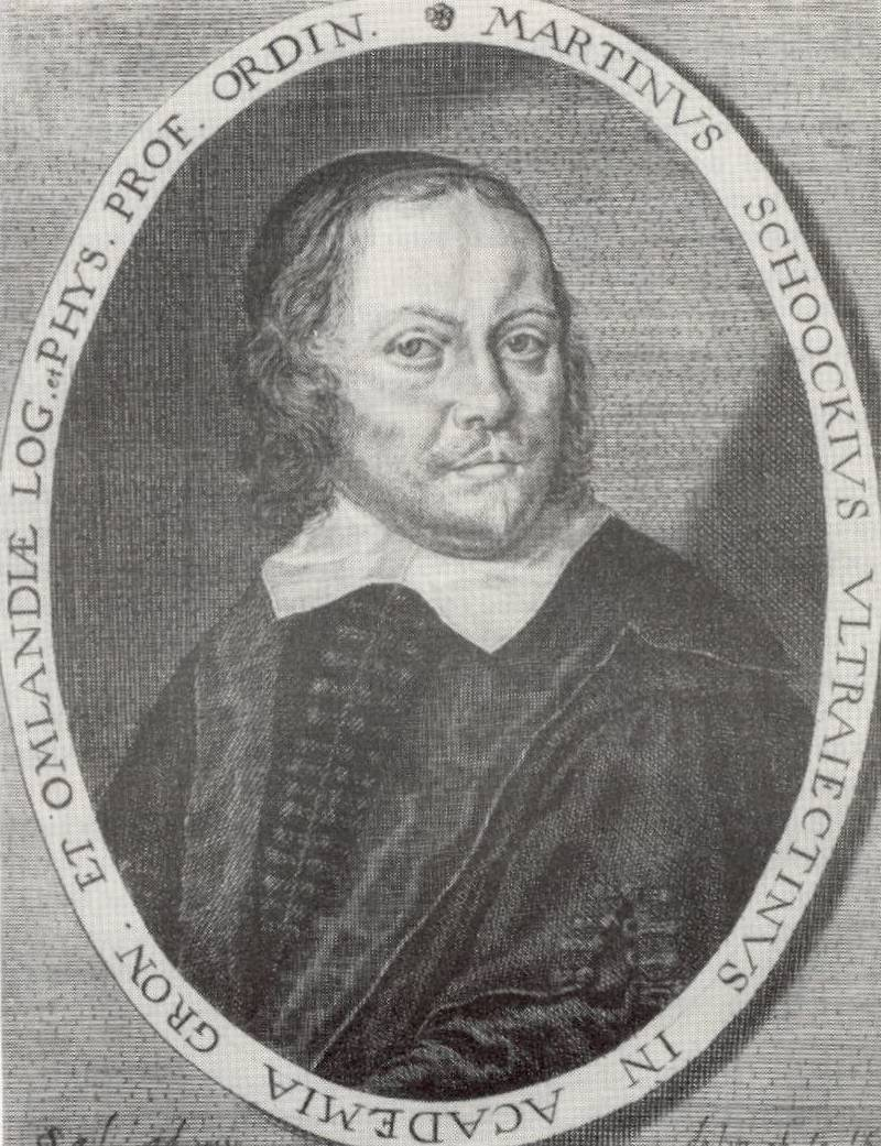 Martinus Schoock, hoogleraar te Utrecht, Deventer, Groningen en Frankfurt aan de Oder, 1614-1669.